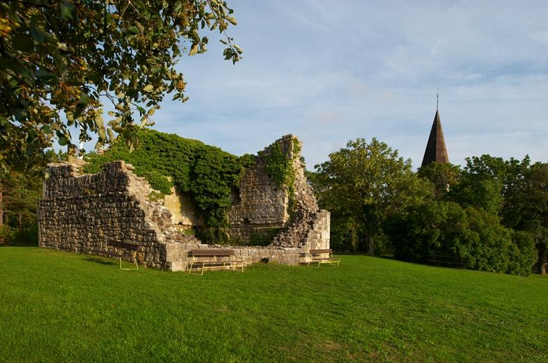 Fröjel 11:1. Medeltida försvarstorn, troligen från 1100-talets mitt. Motiv: Fröjel 11:1 Kategori: Borg Fröjel 11:1. Medeltida försvarstorn, troligen från 1100-talets mitt. Fröjel 11:1.